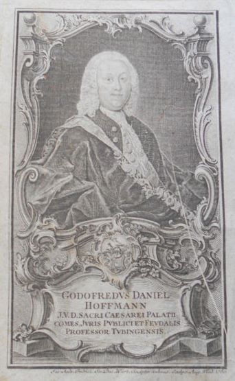 Gottfried Daniel Hoffmann (1719-1780) Jura-Professor und Herzoglich Württembergischer Geheimer Rat, Kupferstich 1760 - 10,8 x 18,5 cm